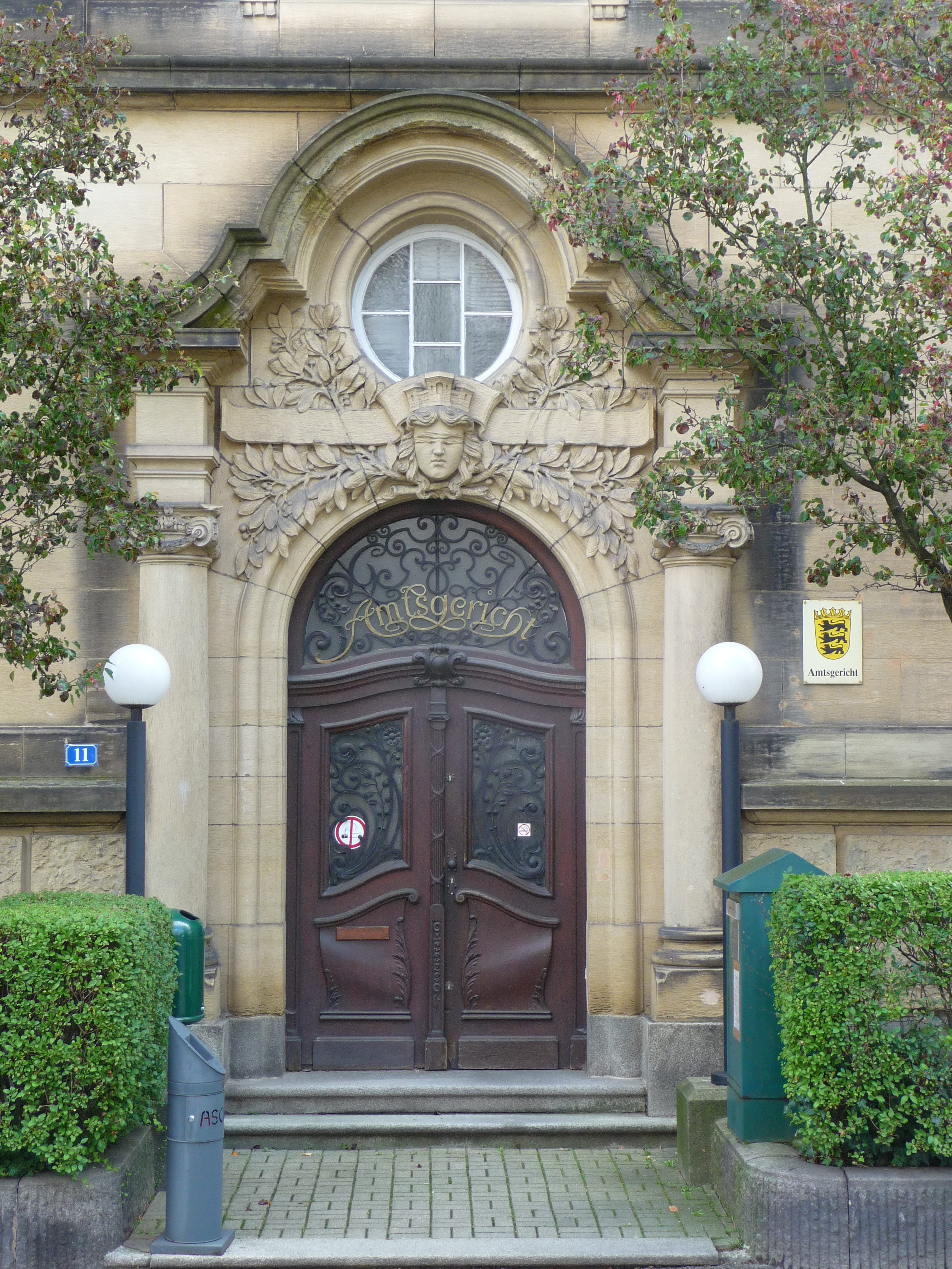 Haupteingang des Amtsgerichs in Weinheim (Rhein-Neckar-Kreis, Baden-Württemberg, Deutschland)